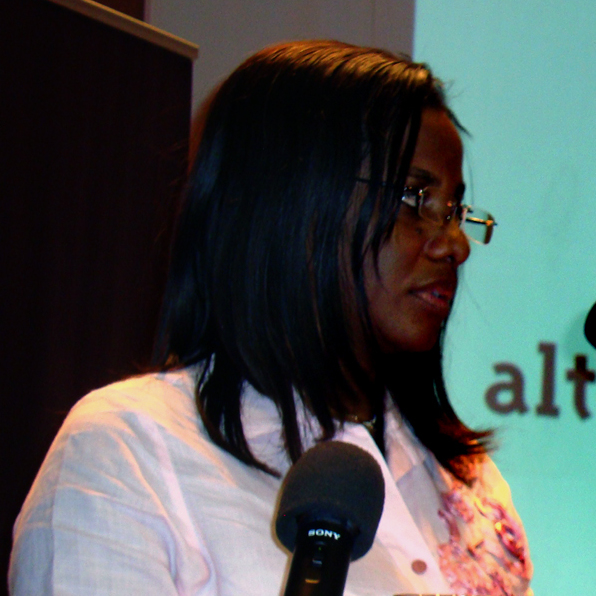 Adriana Carabali Gobernadora encargada del Valle del Cauca